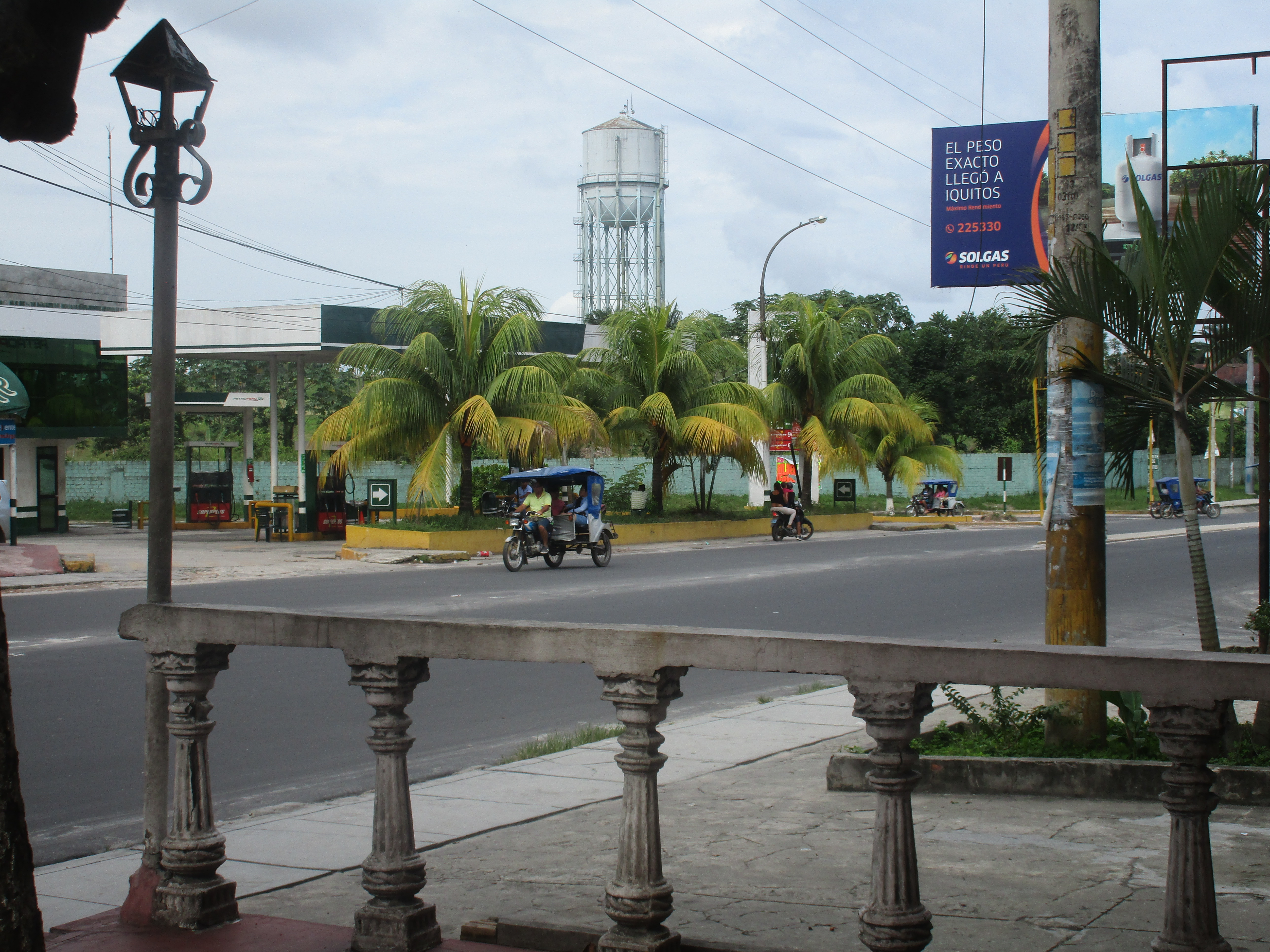 Inmovilidad ciudadana en la av. Quiñones en Iquitos durante el censo urbano peruano del 22 de octubre.